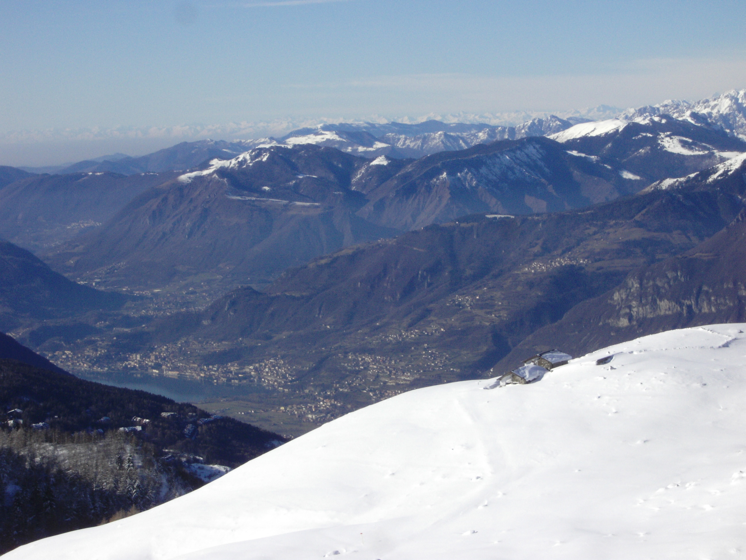 Panorama Montecampione, Artogne, Valcamonica, Prov. di Brescia